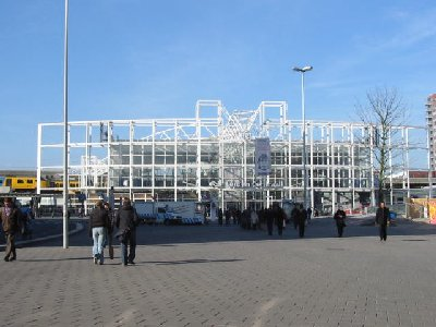 Station Leiden voorzijde